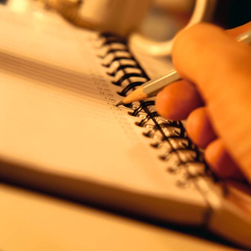 Pris sur le site d'image libre de droit